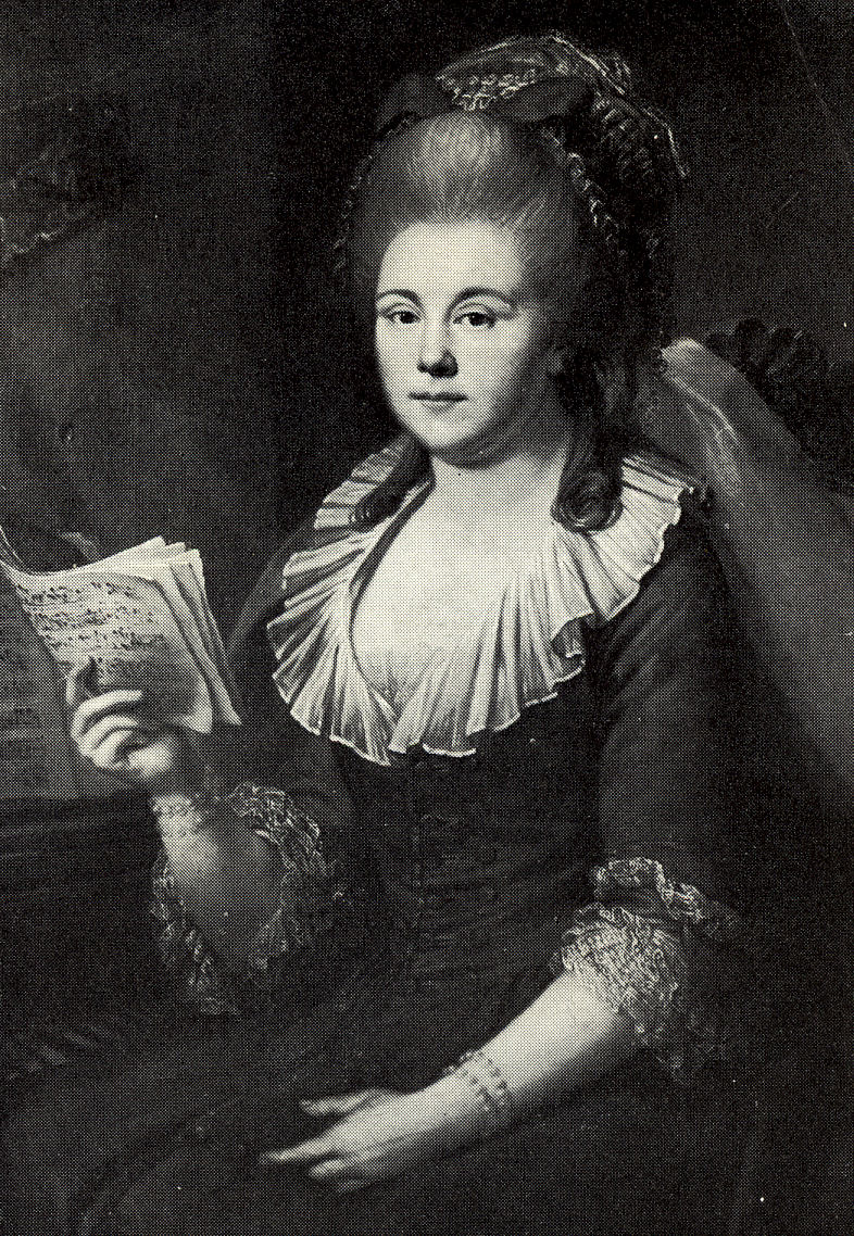 Portrait of Josefa Seyfert (1748-1771) of Mannheim, Germany; seit 1767 Gräfin von Heydeck, sehr junge Geliebte des Kurfürsten Karl Theodor von Bayern (1724–1799), Mutter vier seiner leiblichen Kinder darunter Karl August Reichsfürst von Bretzenheim. Bestattet (Epitaph) Schloss Zwingenberg am Neckar.